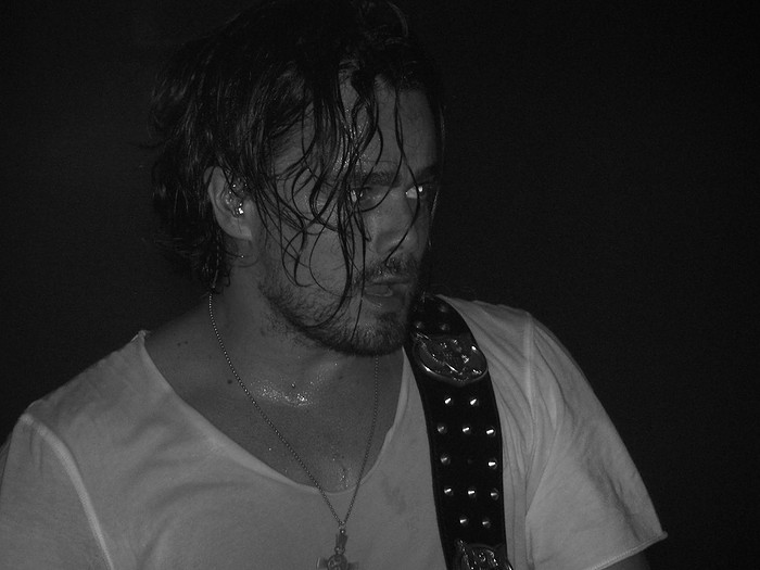 Marco Frank Ferdinand (Dinand) Woesthoff (Gorinchem, 6 september 1972) is een Nederlands zanger. Hij is leadzanger van de Haagse rockband Kane.